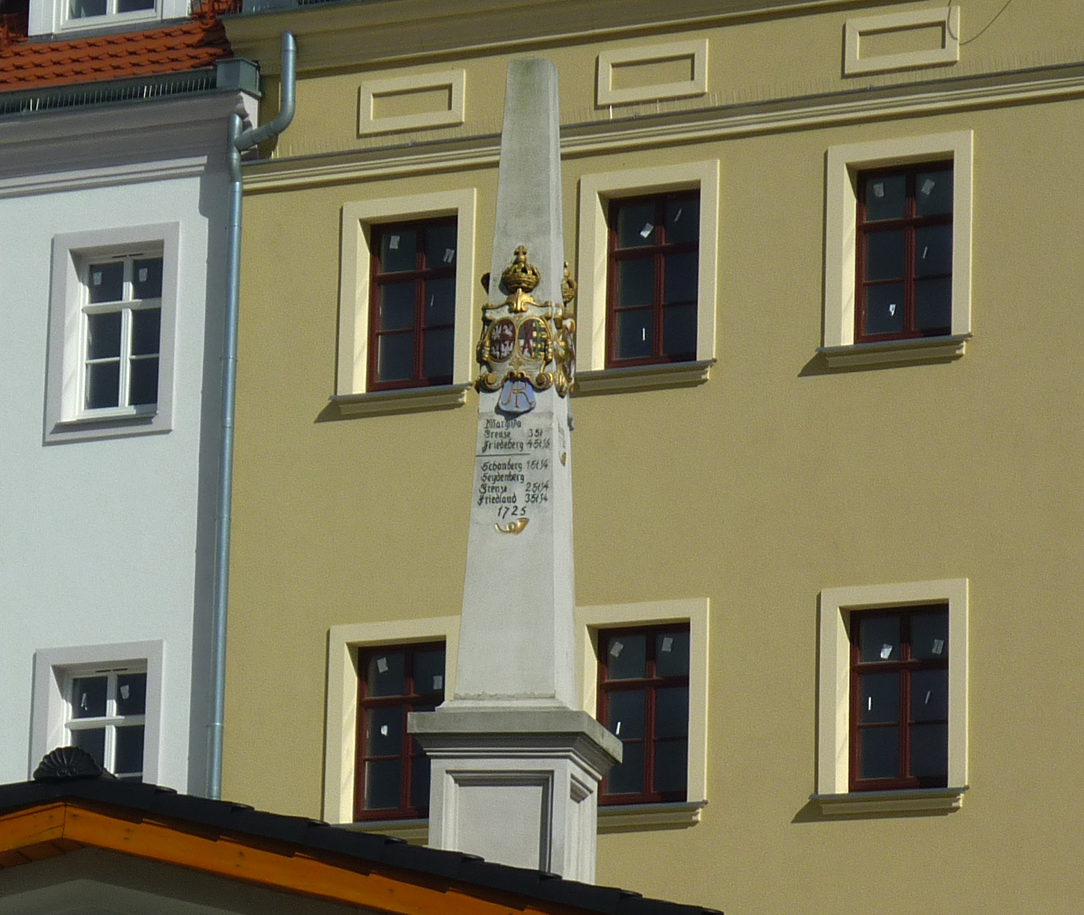 Alte sächsische Postmeilensäule in Zgorzelec in der ul. Wroclawska (neu errichtet 2014)